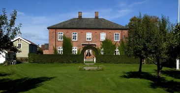 Øverland gård i Bærum, Akershus, ved Bærumsmarka består av to deler som heter Øverland Vestre og Øverland Østre.